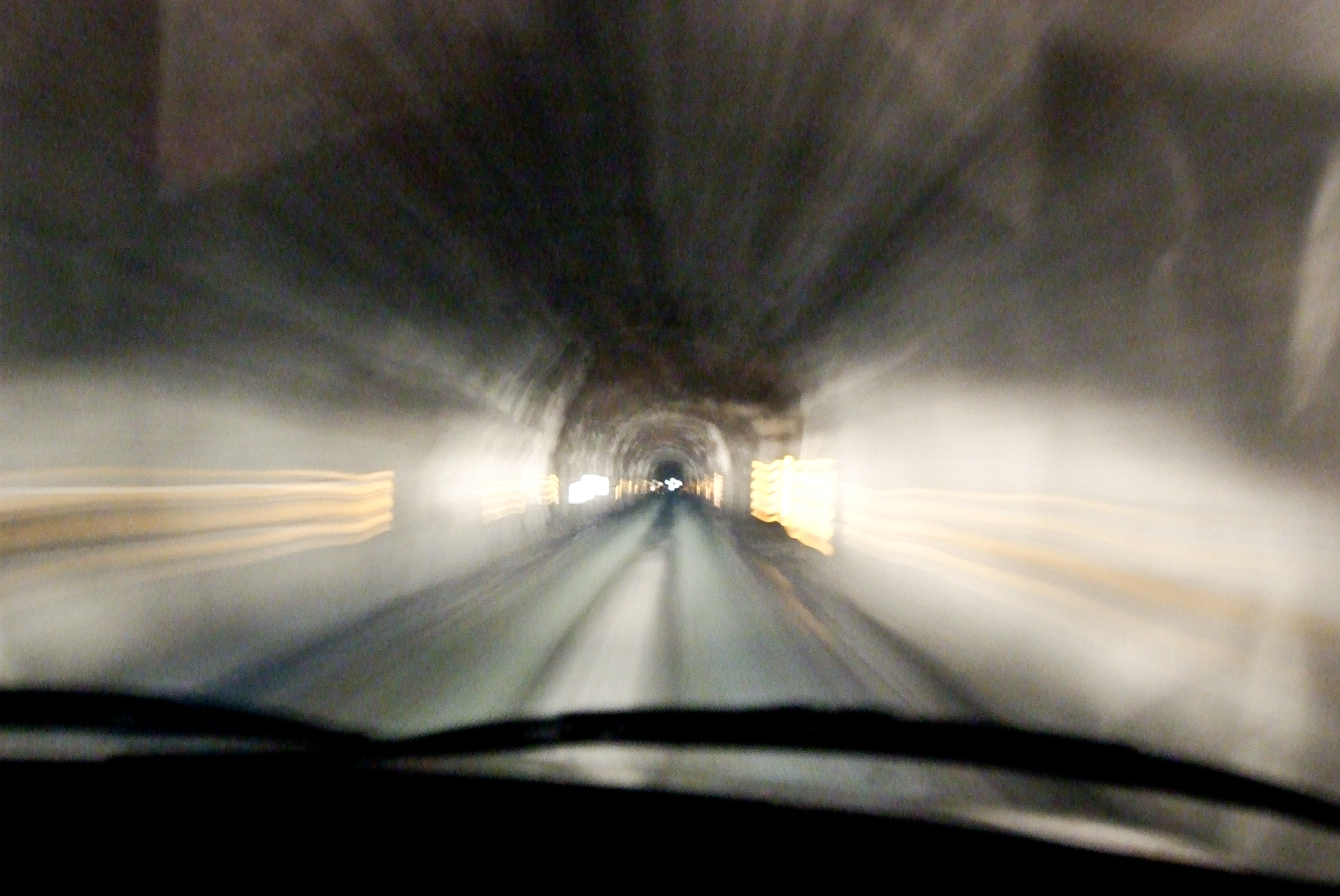 Tunnel from Hvannasund to Árnafjørður, Faroe Islands (Hvannasundstunnilin).